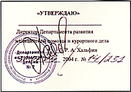 トランスファーファクター及びトランスファーファクタープラスのNK細胞活性化実験および上記、臨床実験などの結果を受けて、ロシア政府は、ロシア連邦の全ての病院、保健所に対して、トランスファーファクター製品の使用を認可しました。